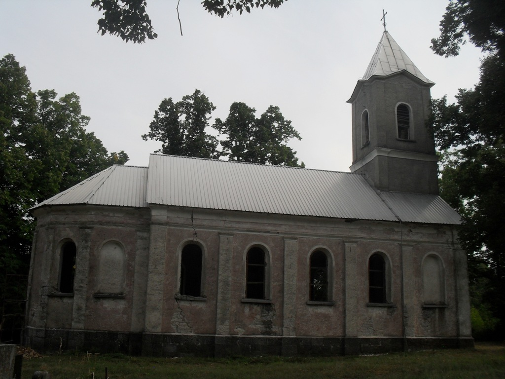 Храм Српске православне цркве посвећен Рођењу Св. Јована Крститеља у Брувну, Лика.